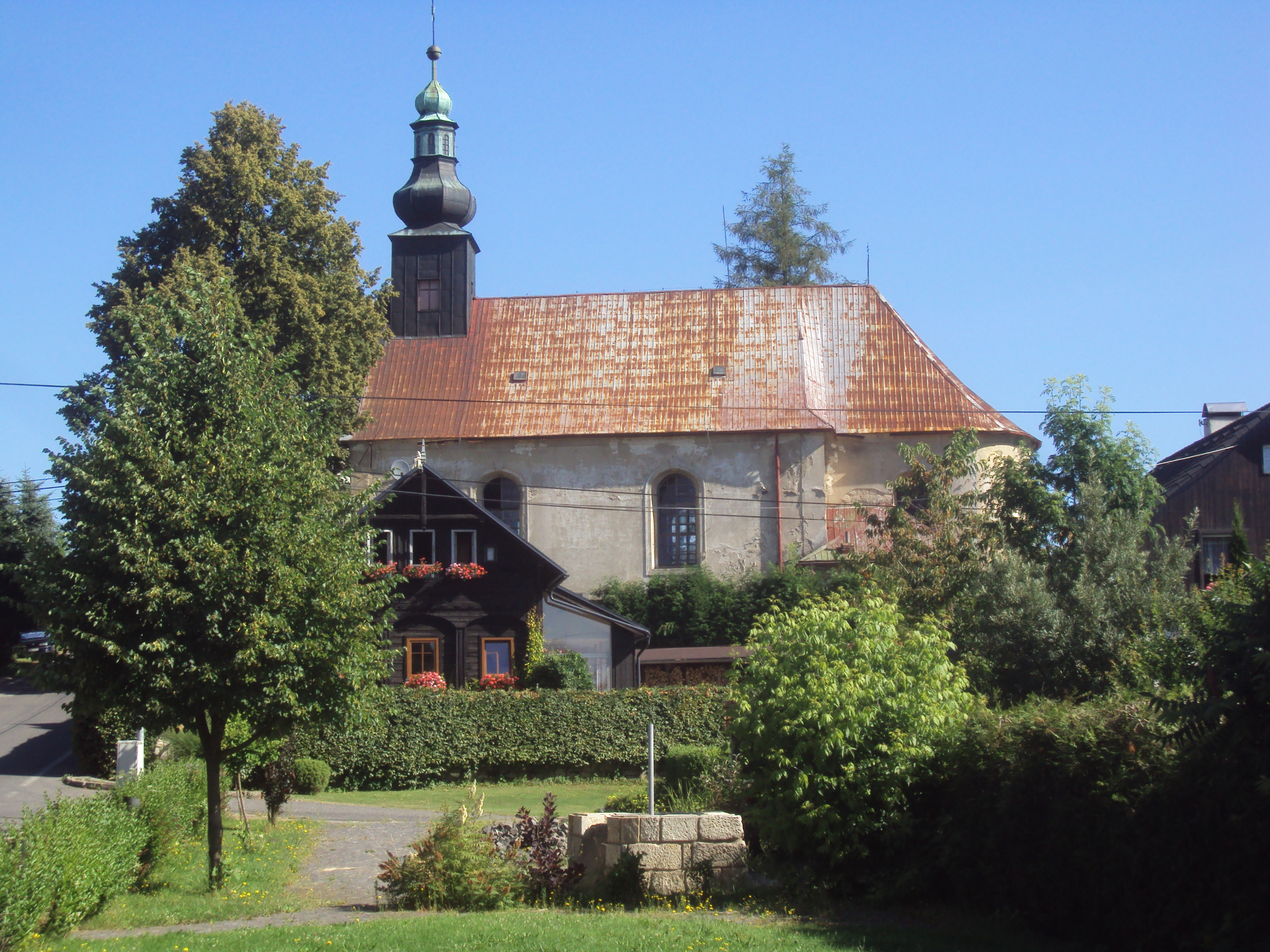 Česky: Kostel v Petrovicích je prázdný, zavřený